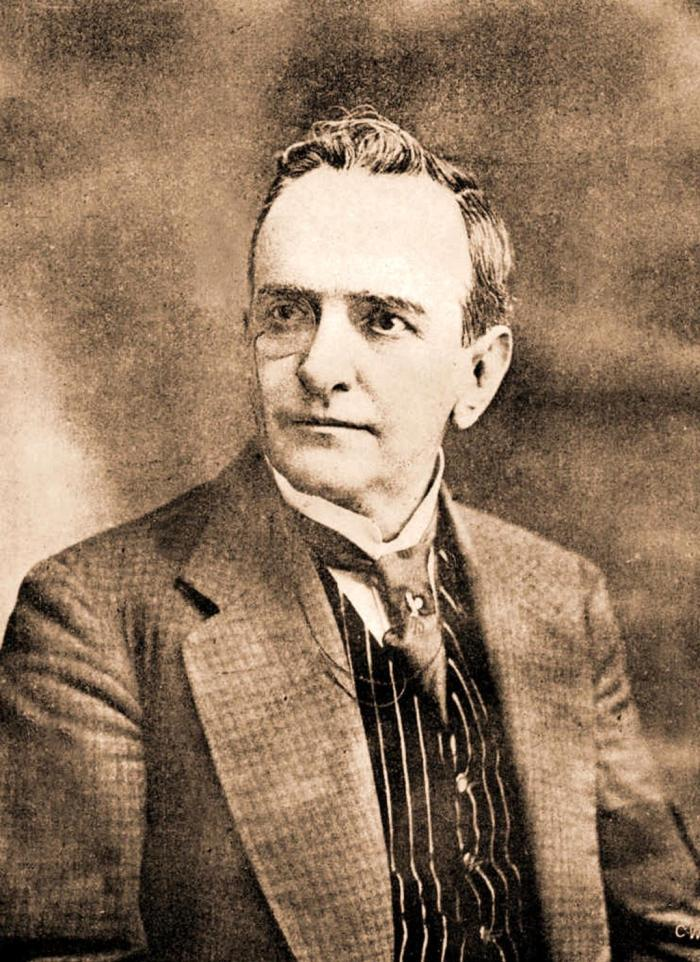 Fotografia de Múcio Scevola Lopes Teixeira (1857 — 1926) escritor, jornalista, diplomata e poeta brasileiro.